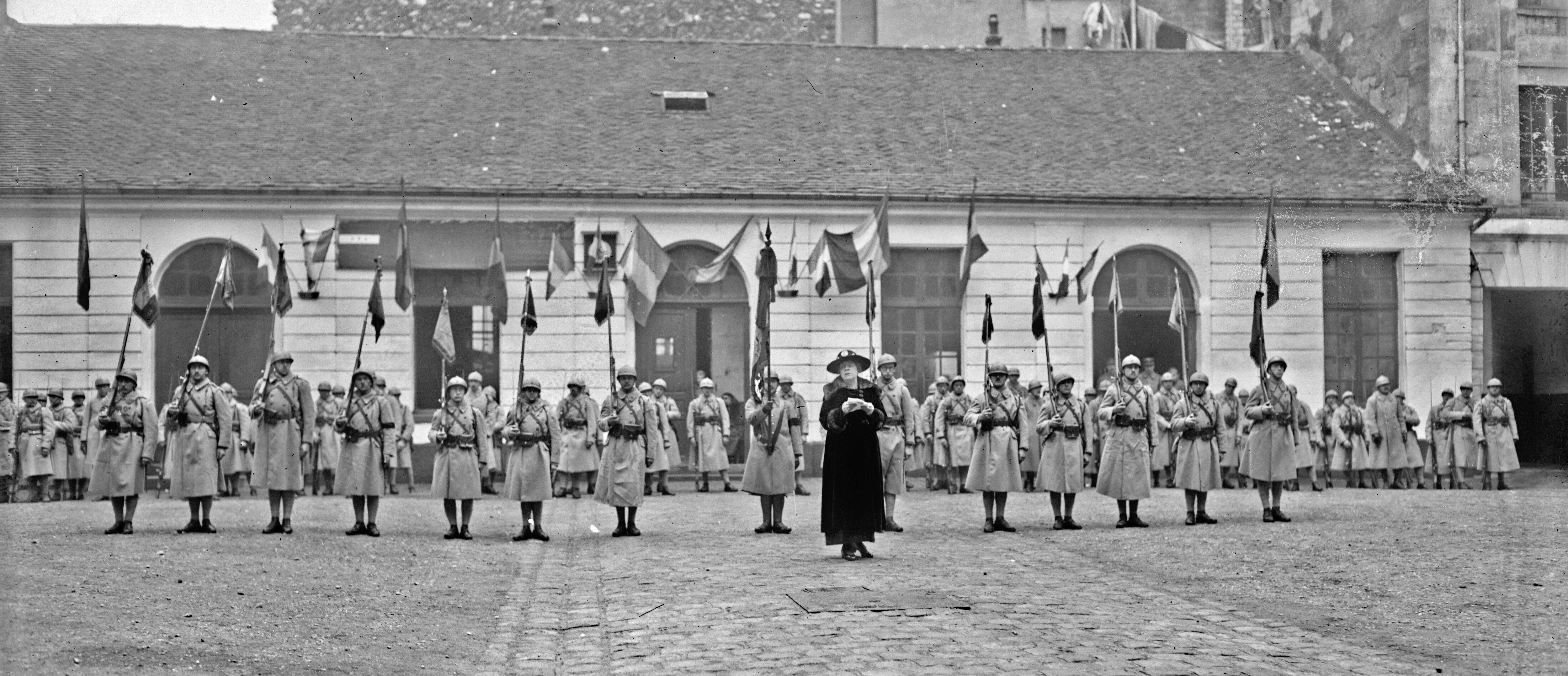 La muse des armées devant les 103e et 104e régiments d'infanterie, 18/11/22, caserne Penthièvre [8e arrondissement de Paris, Mme Léa] Caristie-Mart[el à la fête] du souvenir : [photographie de presse] / [Agence Rol] photogr. nég. sur verre ; 13 x 18 cm (sup.)